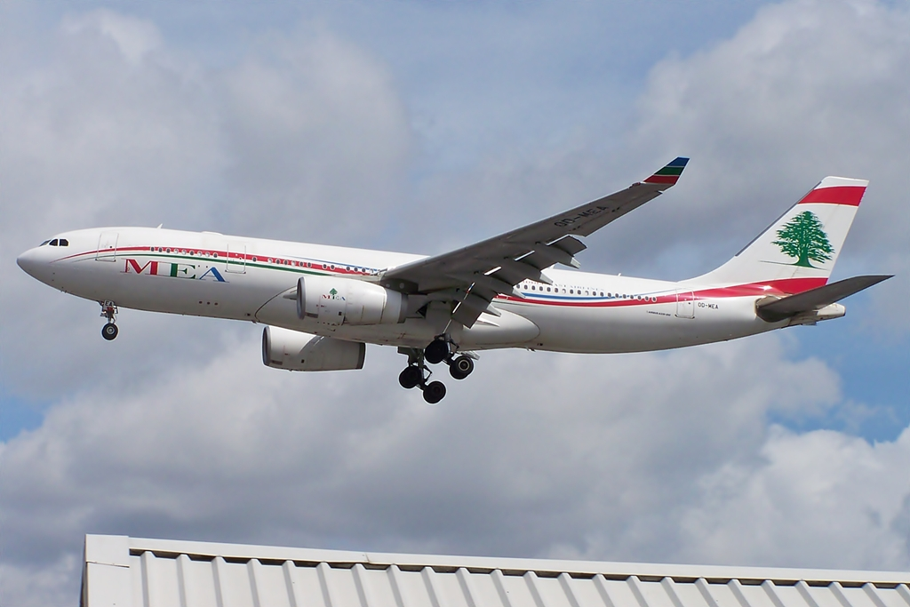 Od-mea a330 mea